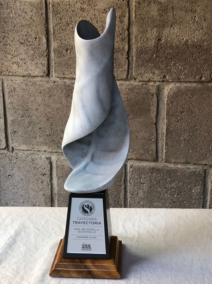 Premio que otorga la Cámara Costarricense de la Construcción a la Trayectoria Profesional de Ingenieros y Arquitectos que han contribuido sustancialmente a la Construcción Sostenible, a través de múltiples proyectos, investigación, conferencias y docencia.